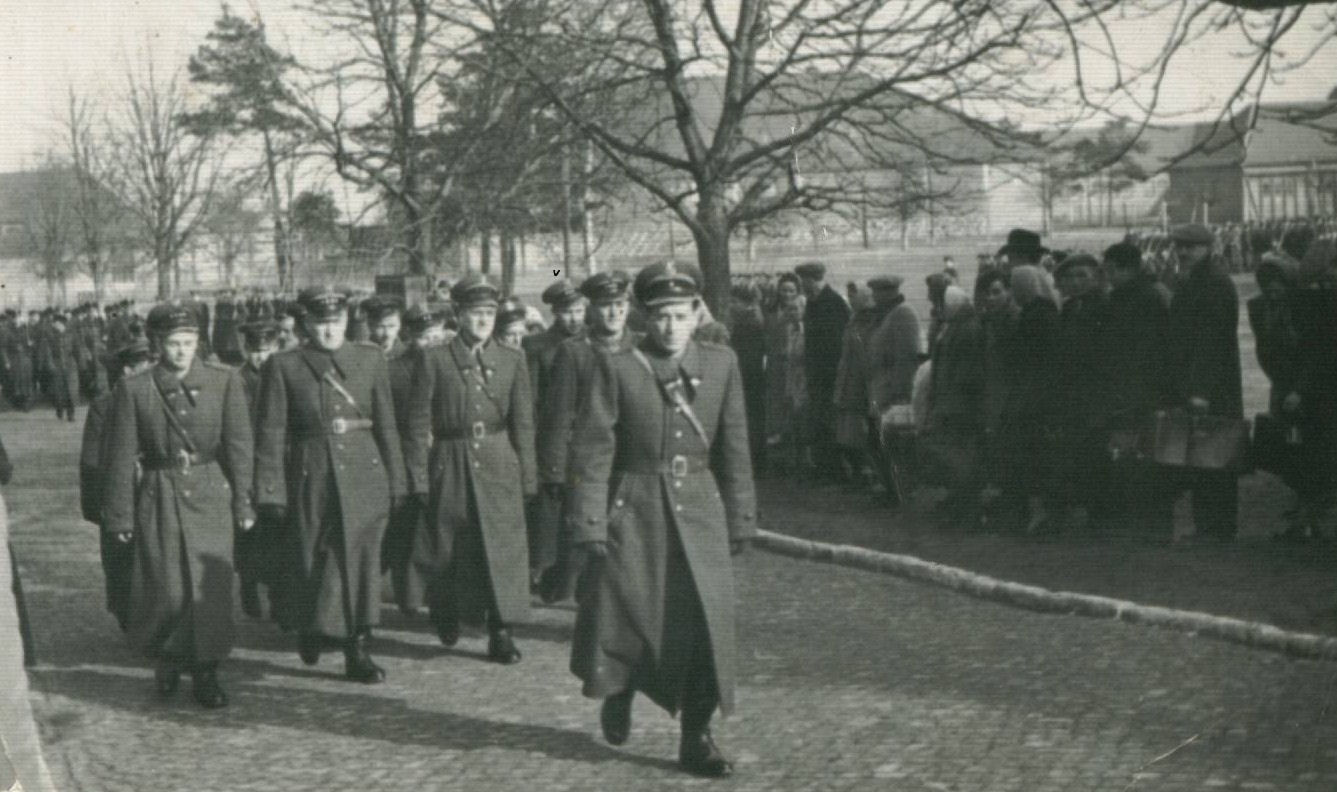 Defilada w 72 pułku zmechanizowanym w Gubinie Własność zdjęcia P.Sz scan Kerim44